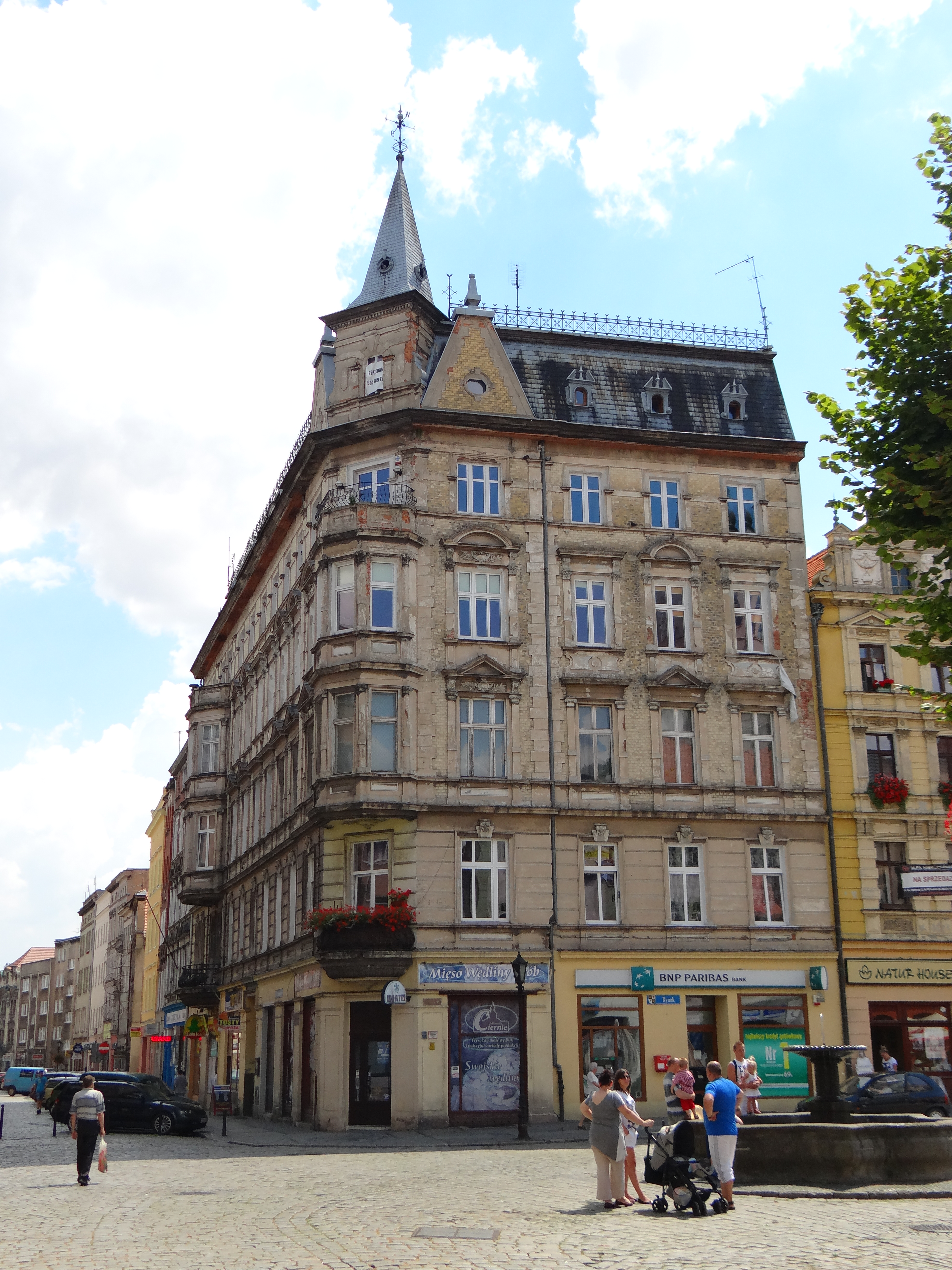 Świdnica, dom, XIX